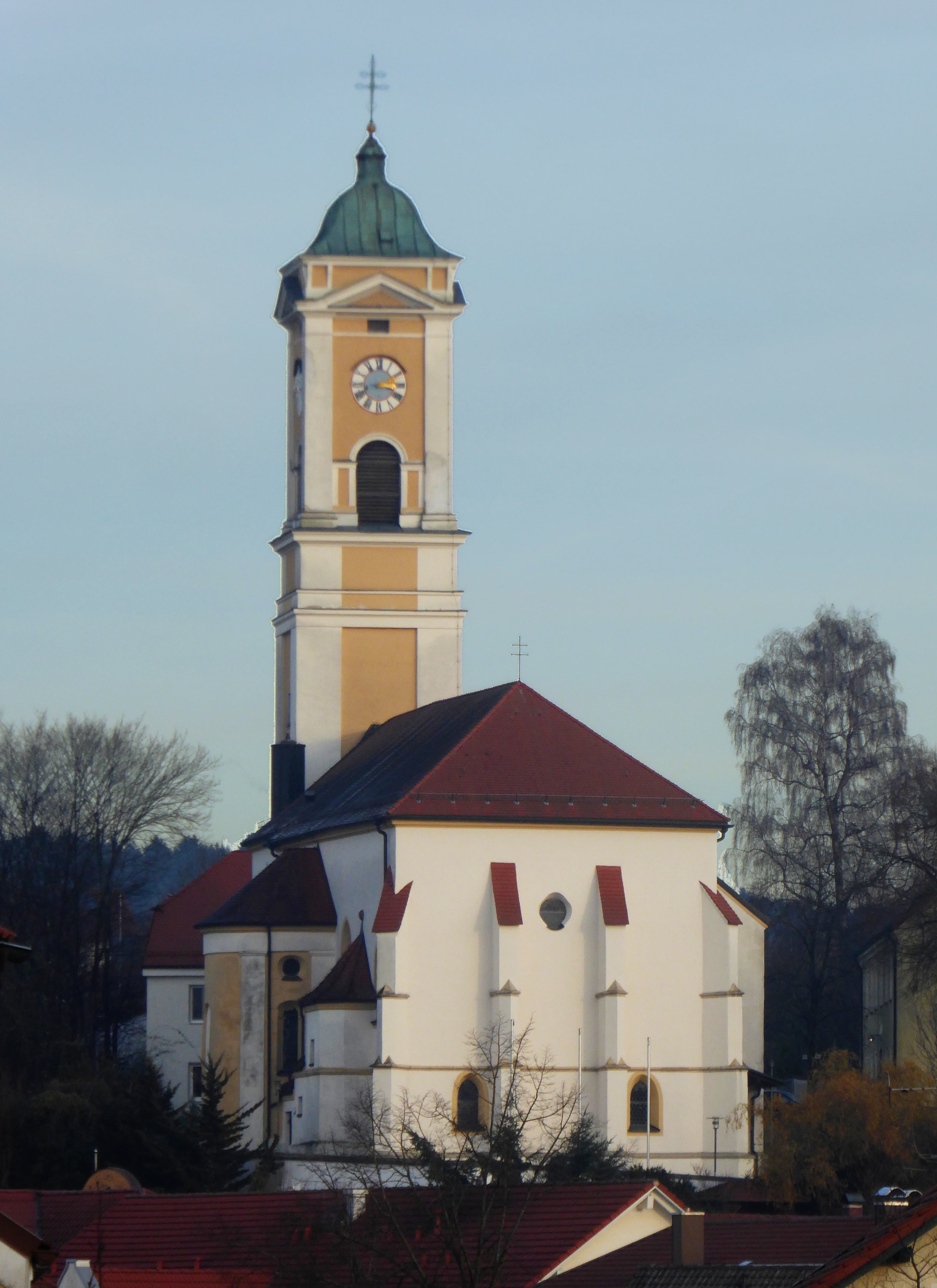 Bad Birnbach, Pfarrkirche von Westen aus größerer Entfernung.